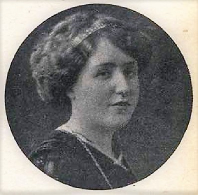 Rosalia Gwis Adami